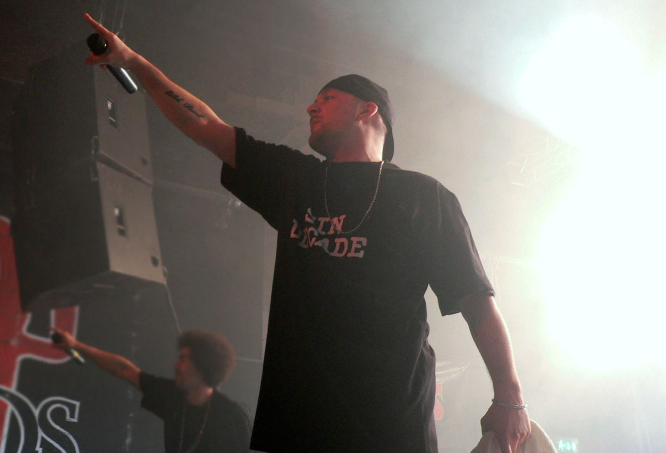 Kool Savas (Skaters Palace - 30.01.2009)